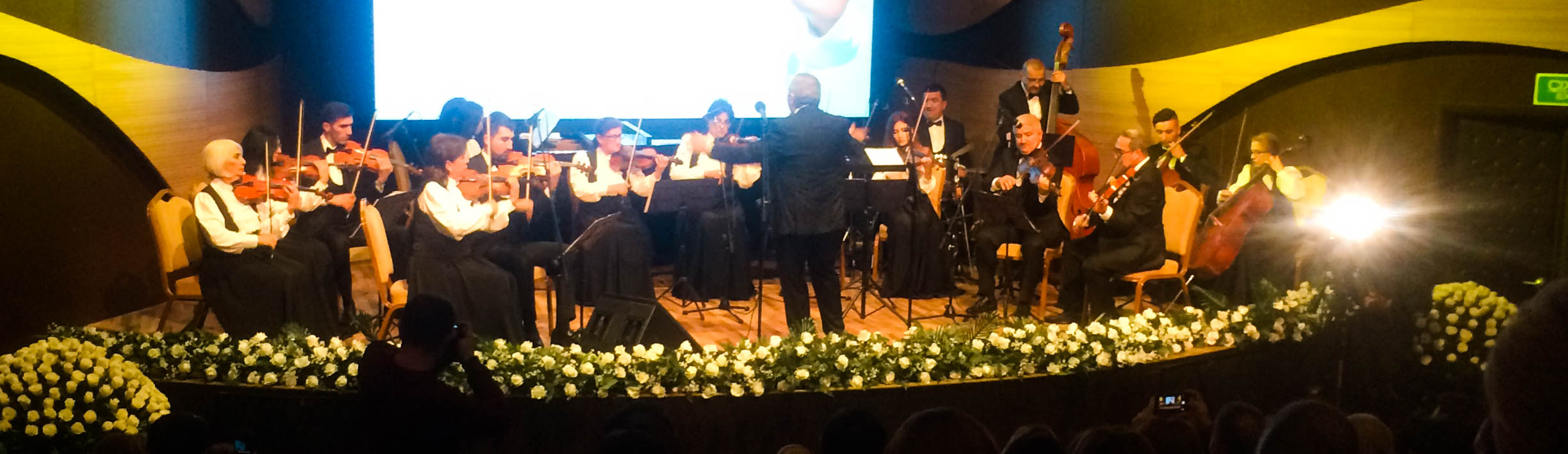 Gəncə Dövlət Filarmoniyasının Kamera Orkestrı çıxış zamanı, 30 noyabr 2017, Azərbaycan Beynəlxal Muğam Mərkəzi